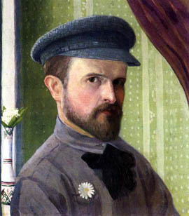 Художник-авангардист Иван Васильевич Клюн (Клюнков). Автопортрет.